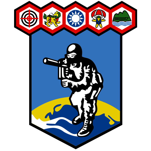 Republic of China Military Police Special Services Company emblem